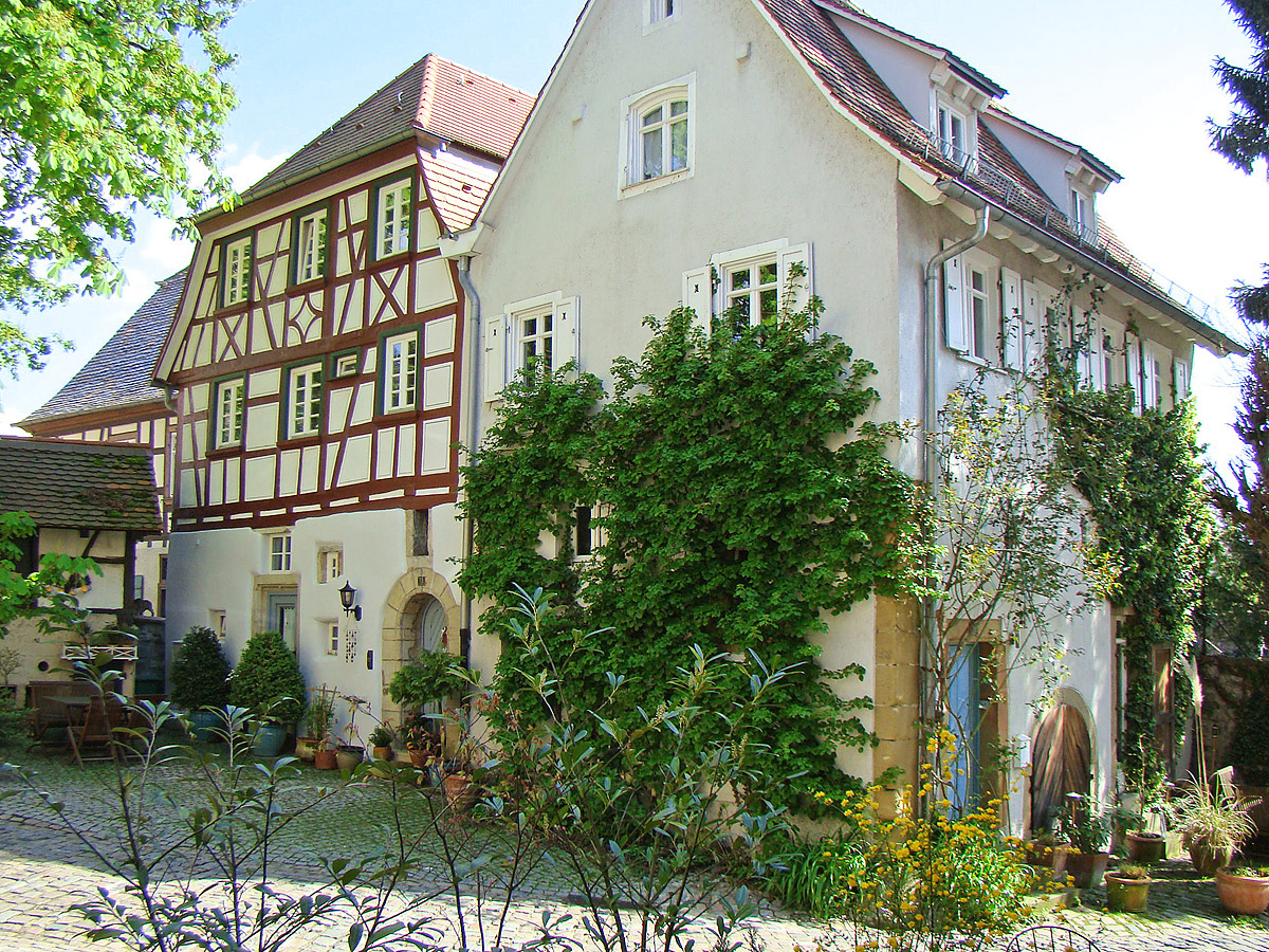 Bad Wimpfen, Burgviertel: Romanisches Wohnhaus innerhalb der ehem. Pfalz Wimpfen